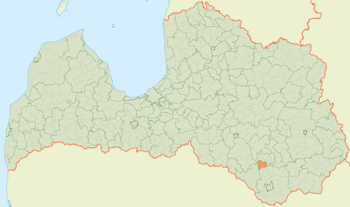 Расположение Ницгальской волости на карте Латвии